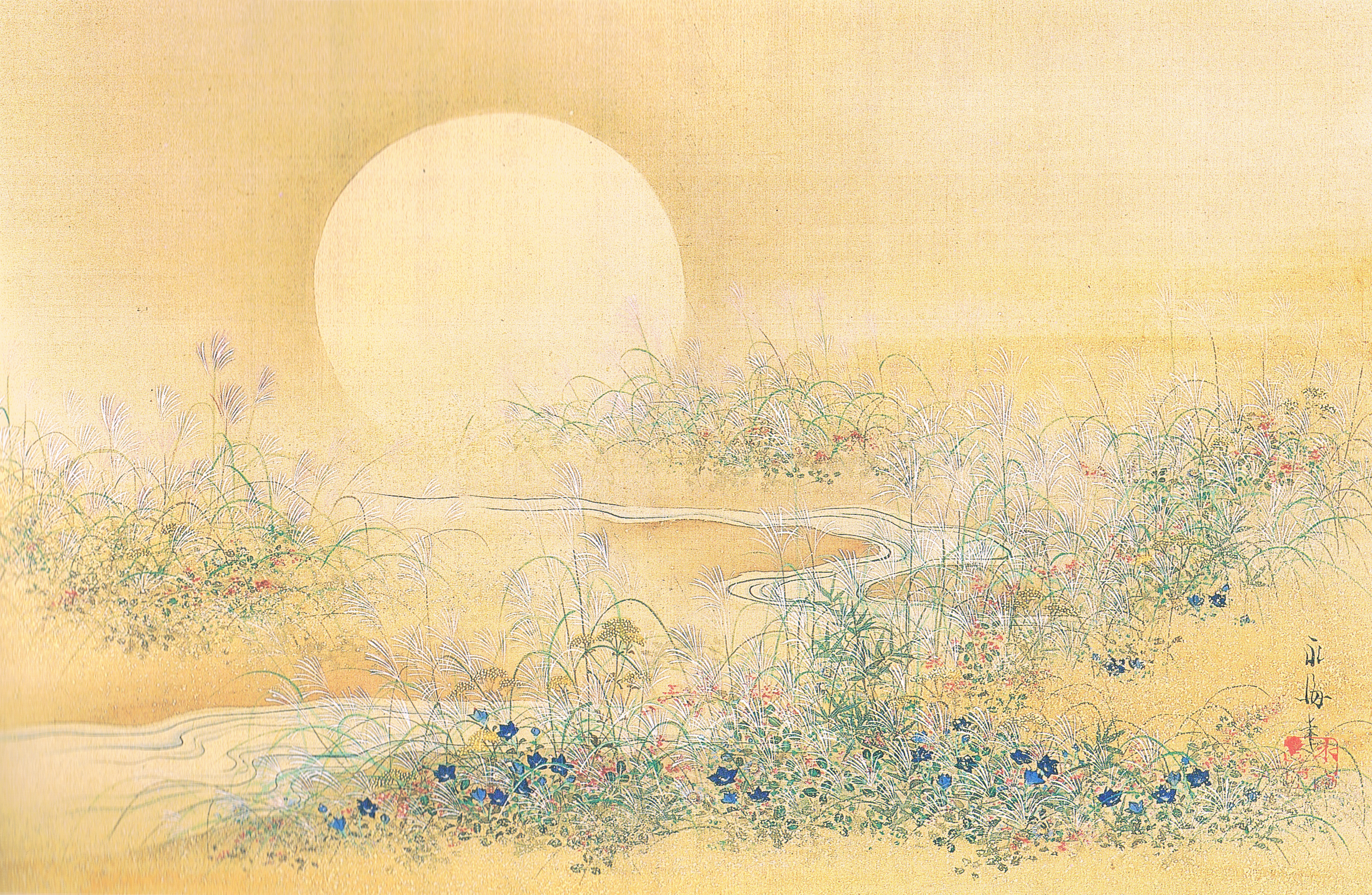 佐竹永海筆 秋月野花図 絹本着色金砂子